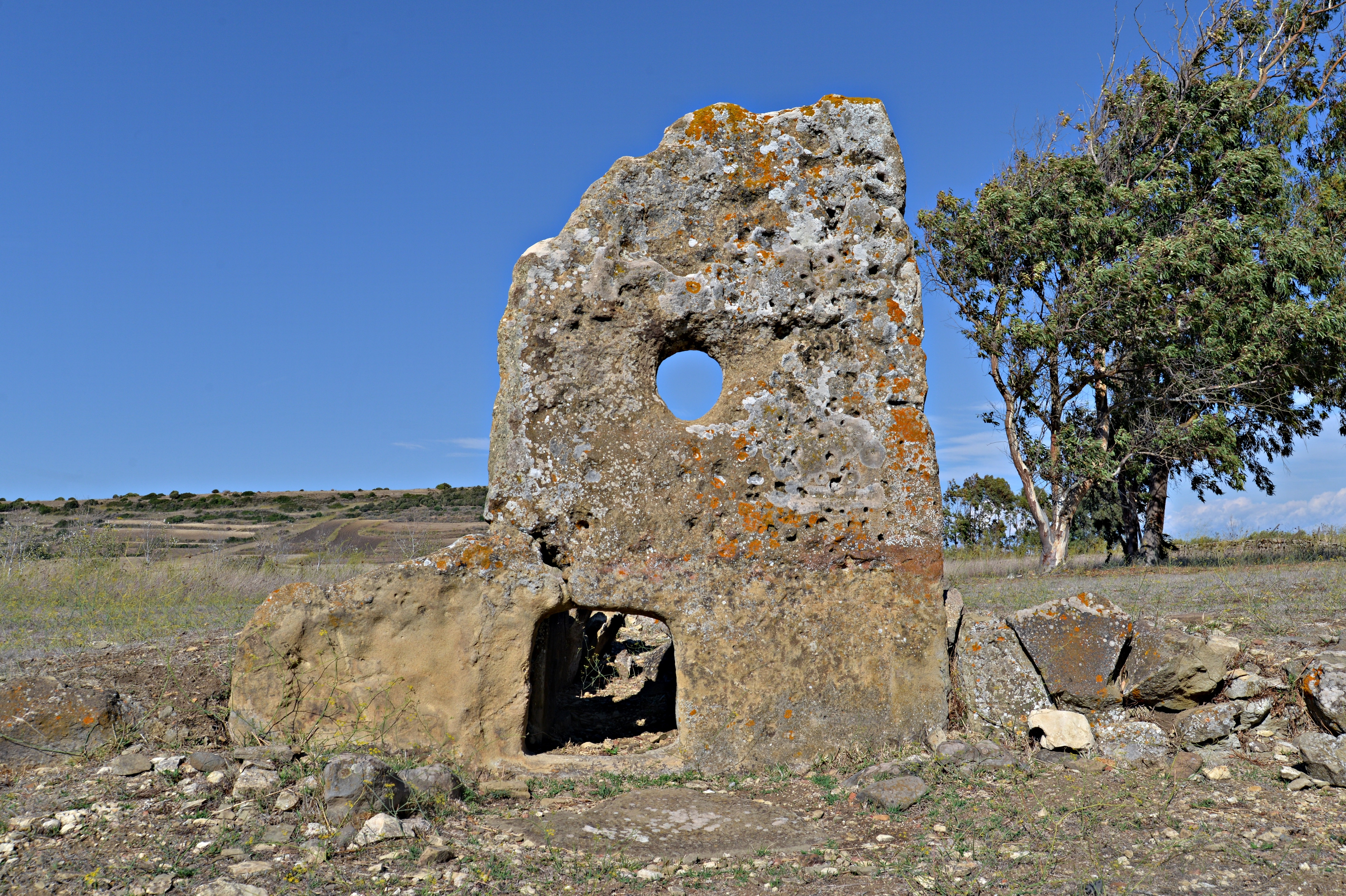 Se varchi quella porta scoprirai cosa c'è nell'aldilà - 20L9860010 This is a photo of a monument which is part of cultural heritage of Italy.